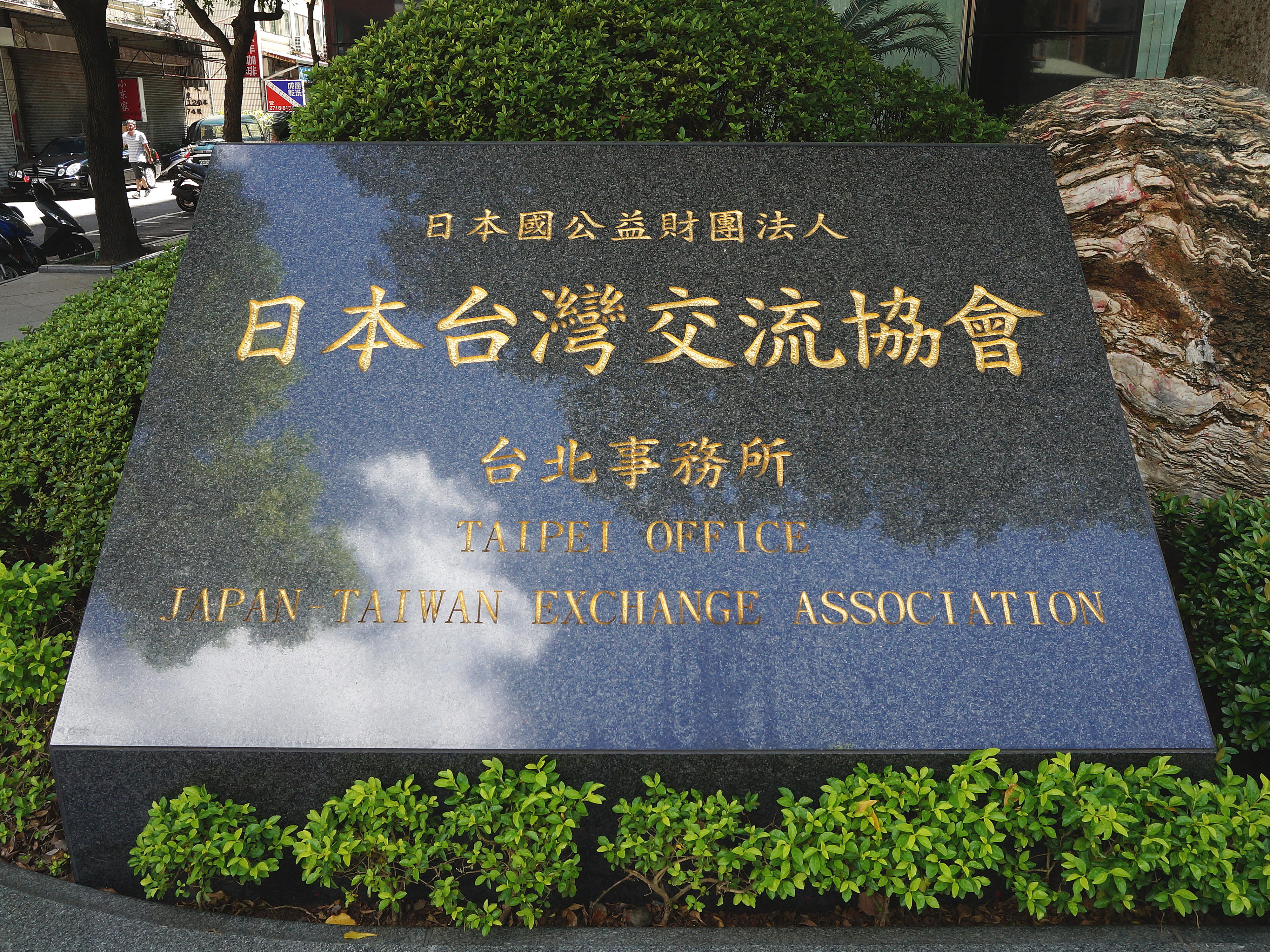 日本台灣交流協會台北事務所額石。